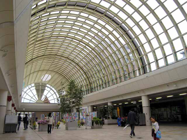 エルフィンパーク内部 撮影場所 エルフィンパーク